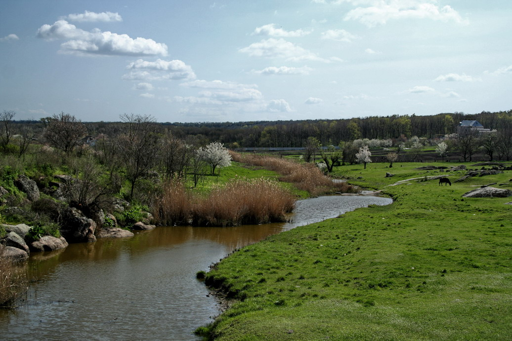 Arbuzinka river near Trikrati